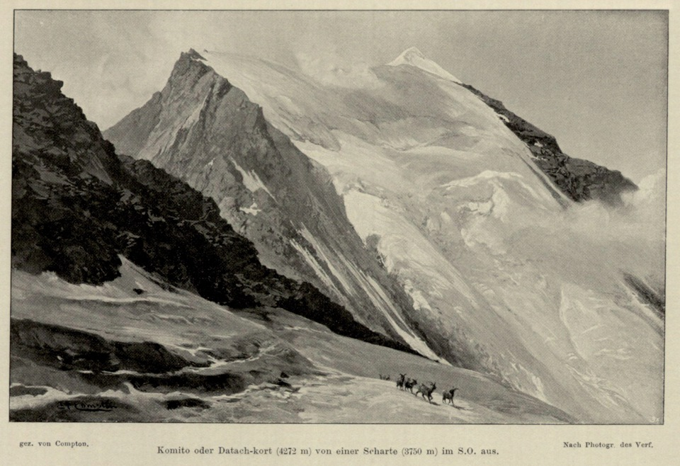 Гора Комито (Даттах-Корта)